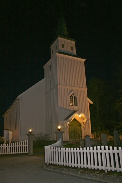 Egge kyrkje en: Egge church